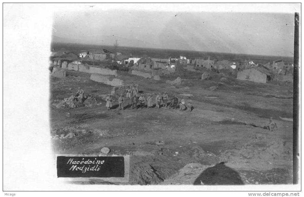 Меджитлия през Първата световна война